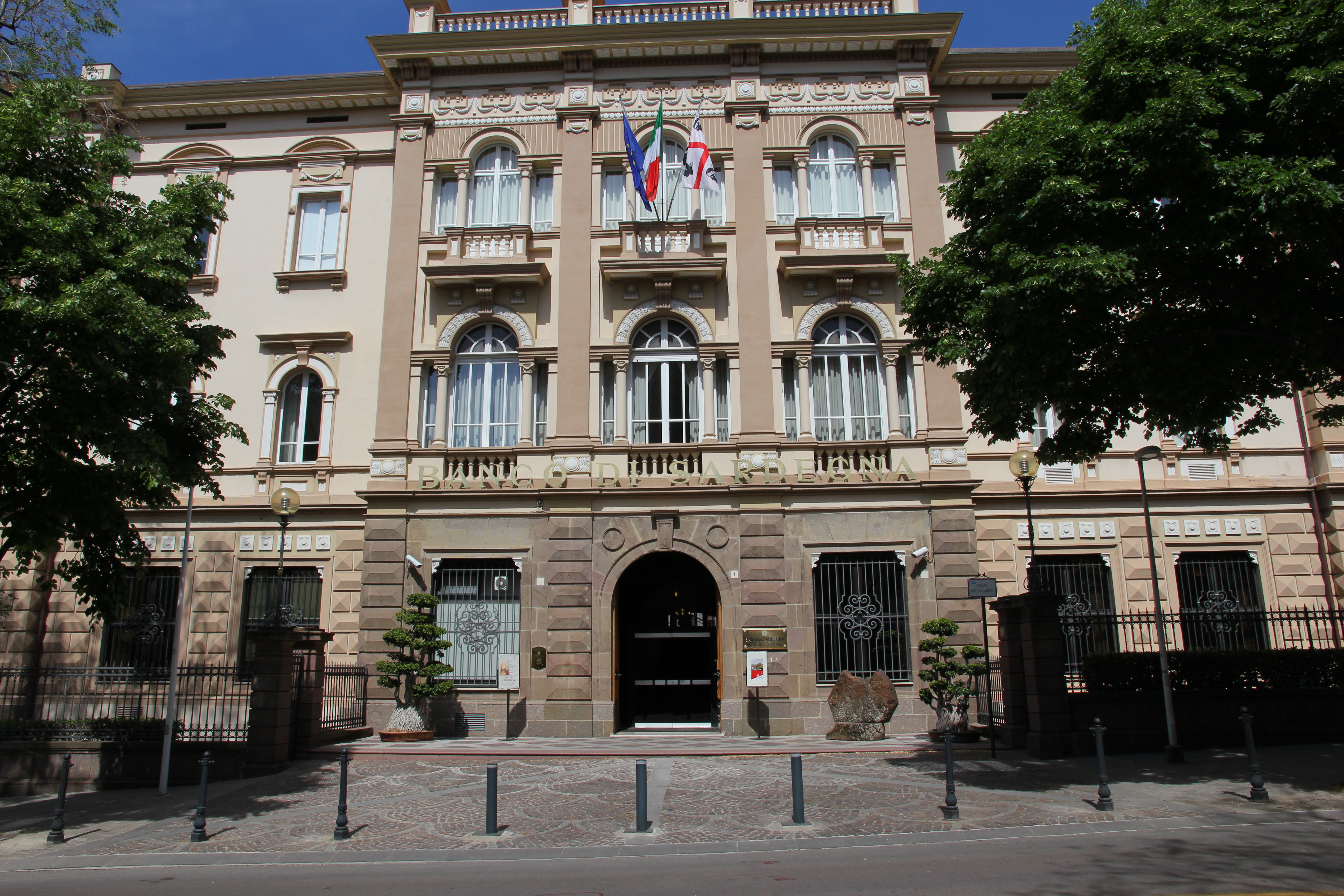 Sassari - Palazzo del Banco di Sardegna - Sede centrale